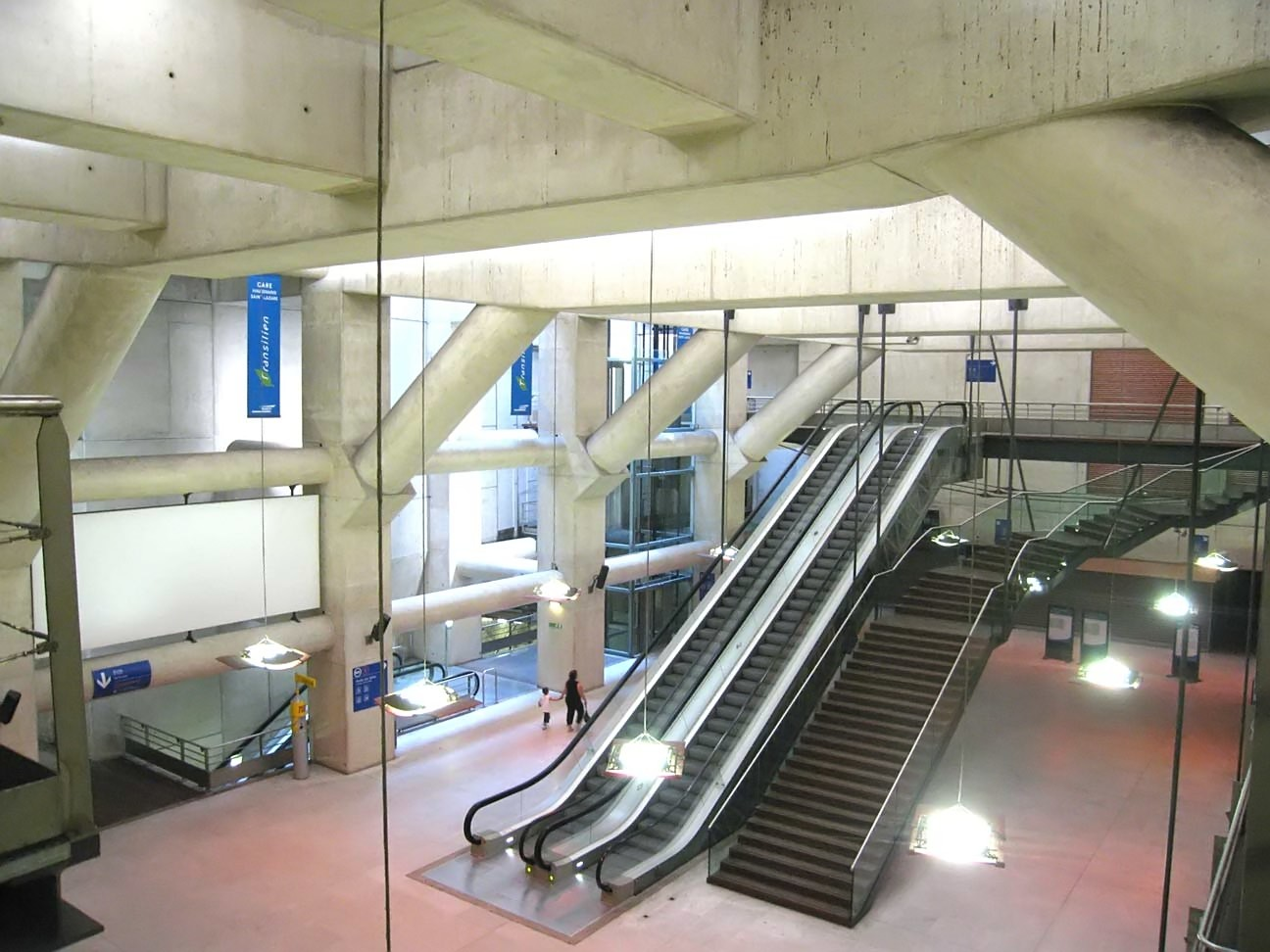 RER Paris Ligne E Salle échange station Haussmann - Saint-Lazare, Paris, France.